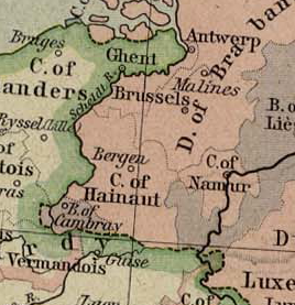 Carte des comtés de Hainaut et de de Namur, en 1477 : Map of counties of Hainaut and of Namur, in 1477